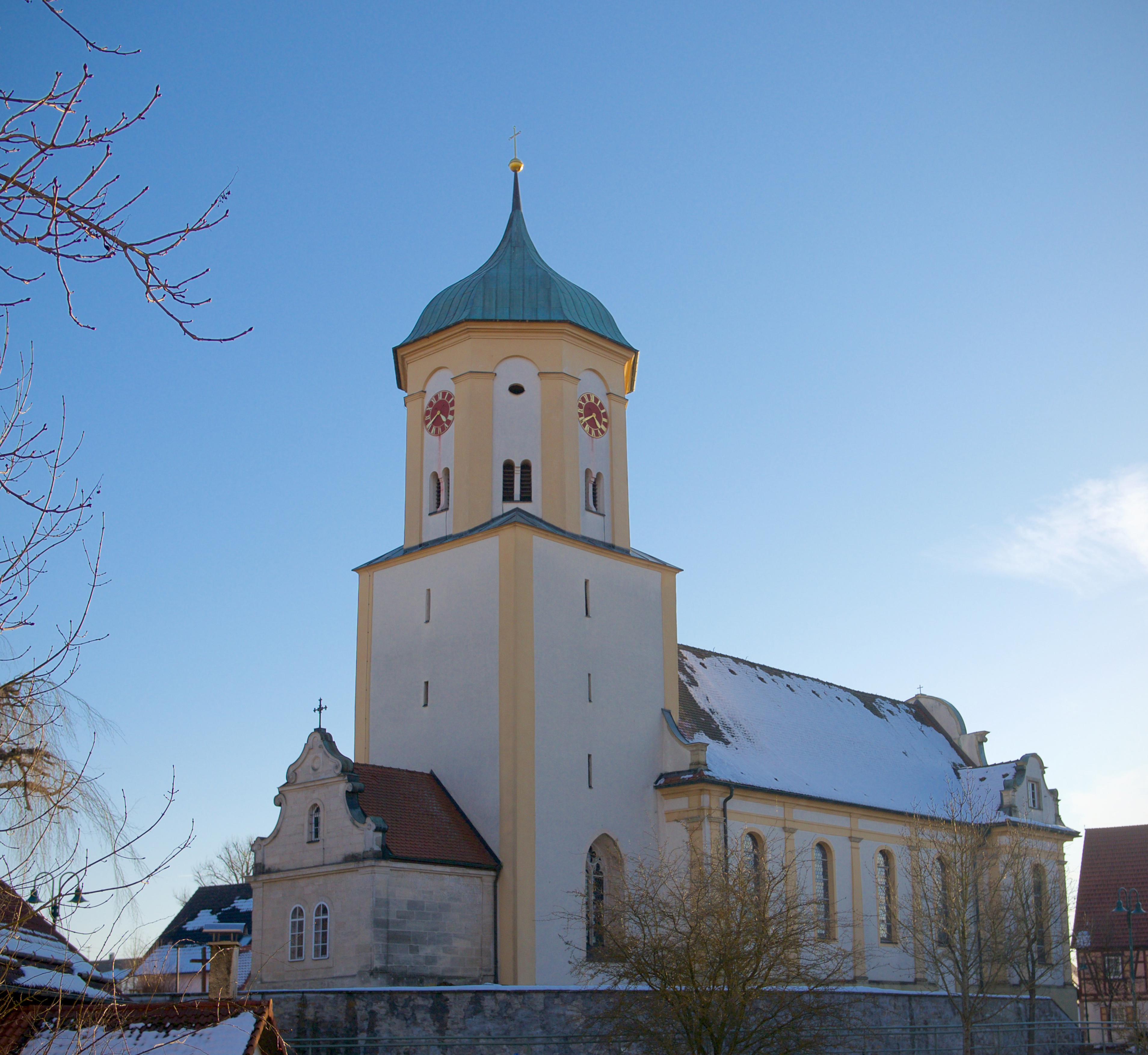 Katholische Kirche St. Sebastian in Schechingen